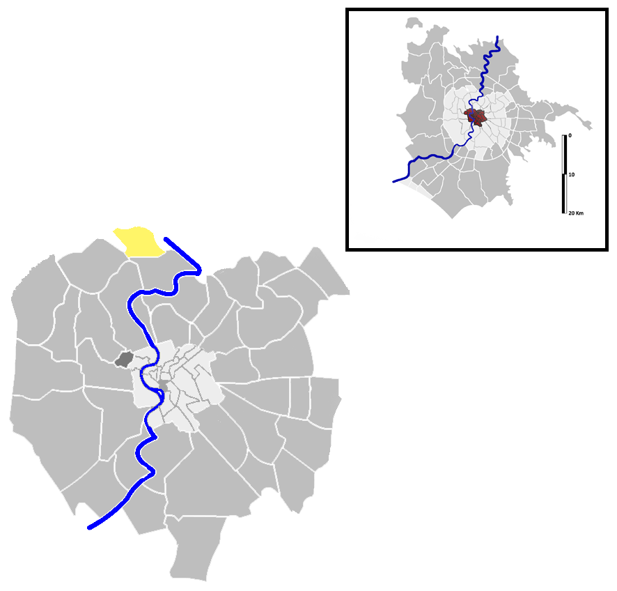 Tor di Quinto